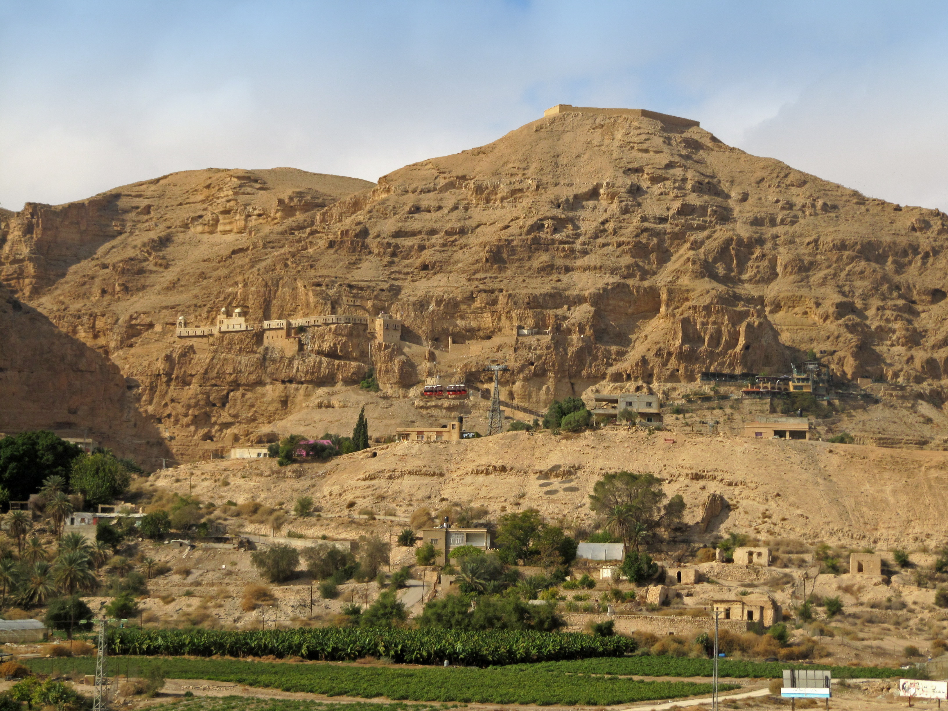 Jericho (more details in the photo's title) יריחו (מידע נוסף בשם הקובץ)